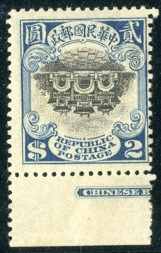 發行日逾90年屬自由版權之中華民國郵票-北京一版宮門2元倒印郵票